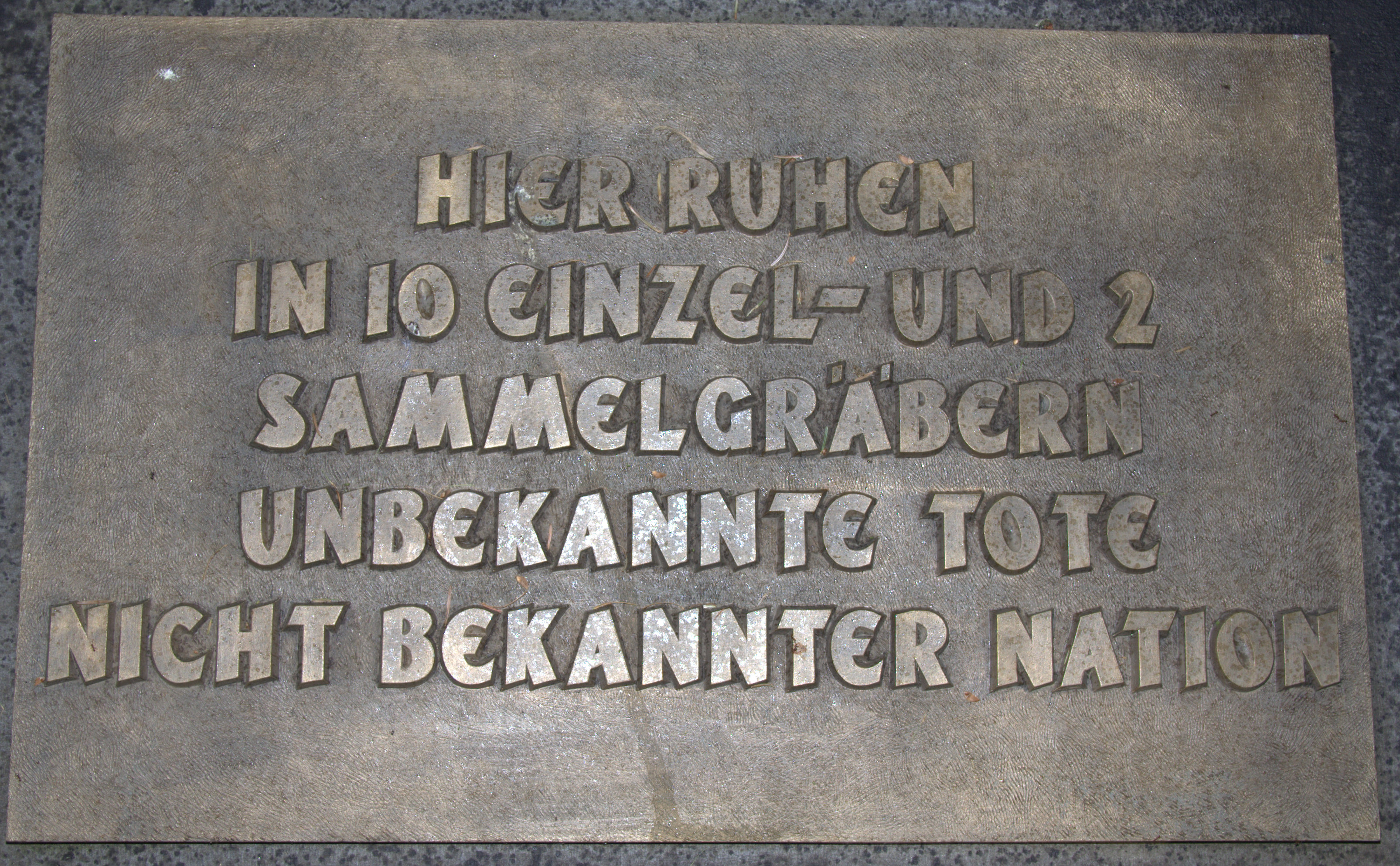 Gedenktafeln für die Ehrung der verstorbenen des Kriegsgefangenenlagers Stalag IX A Ziegenhain